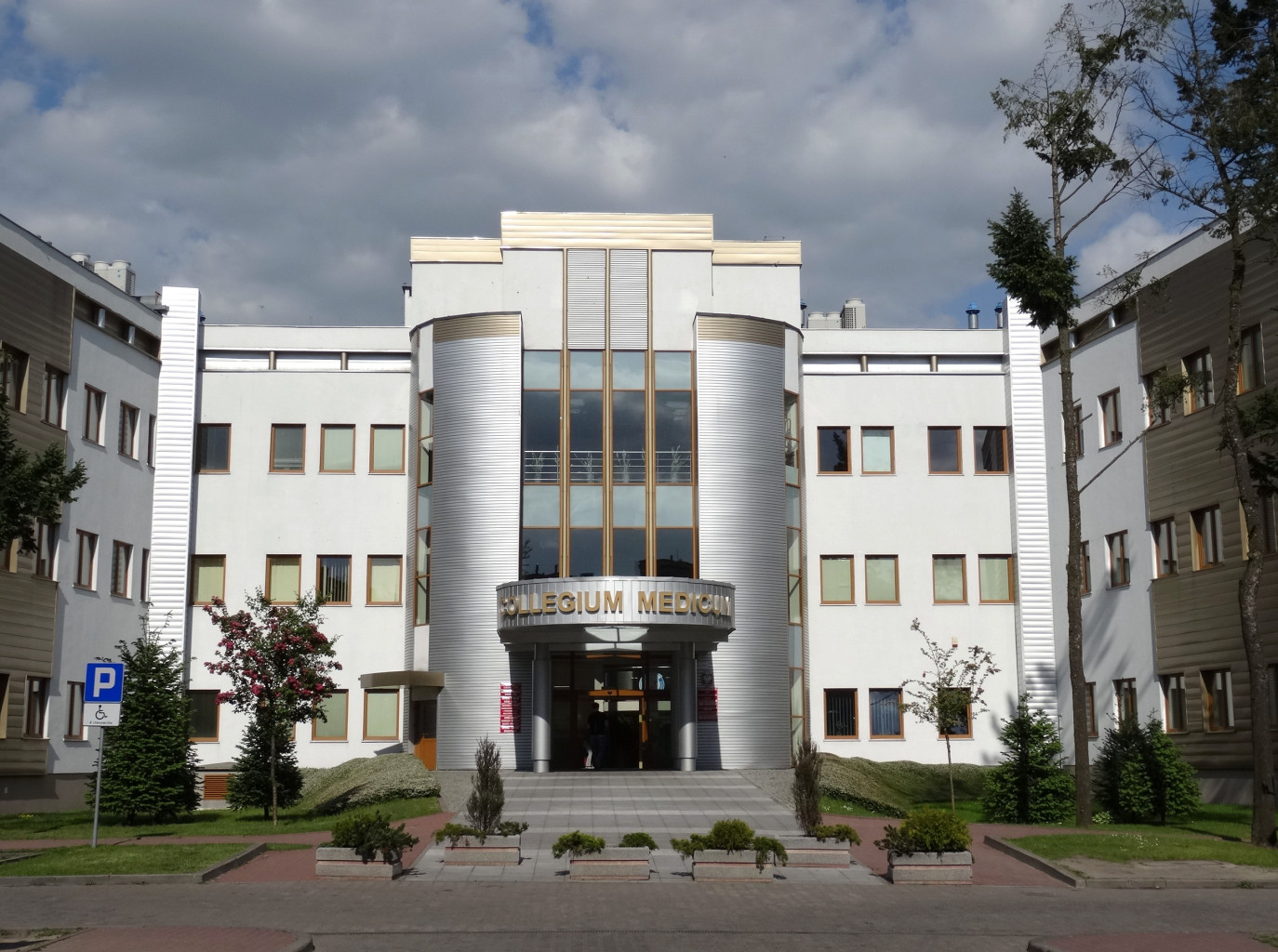 Wydział Farmacji Collegium Medicum Uniwersytetu Mikołaja Kopernika przy ul. Jurasza w Bydgoszczy